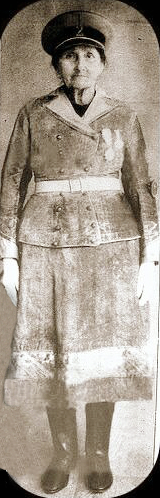 María Quiteria Ramírez1 (Illapel, ca. 1850-19292 ) fue una cantinera chilena durante la Guerra del Pacifico.